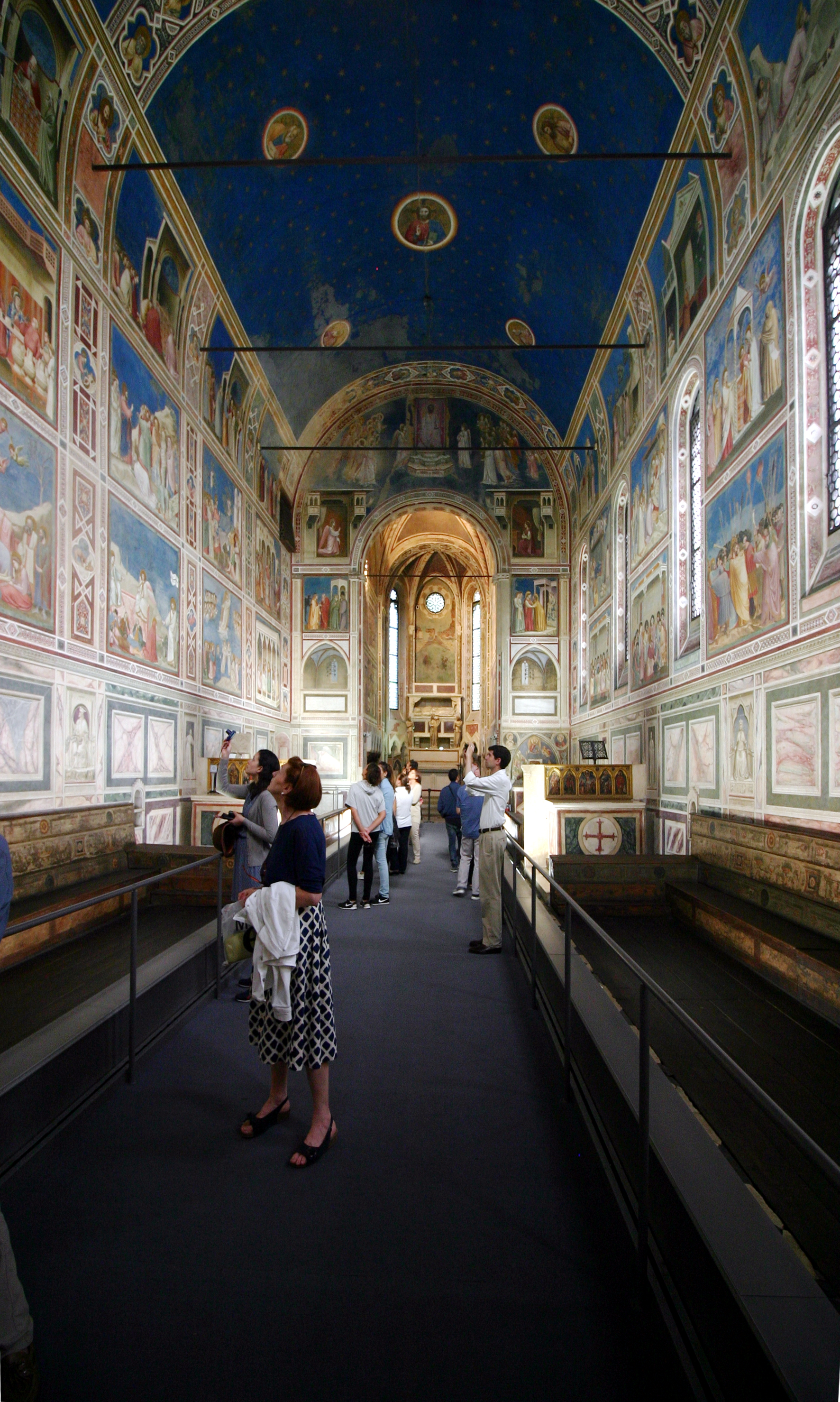 Capella degli Scrovegni - Padua